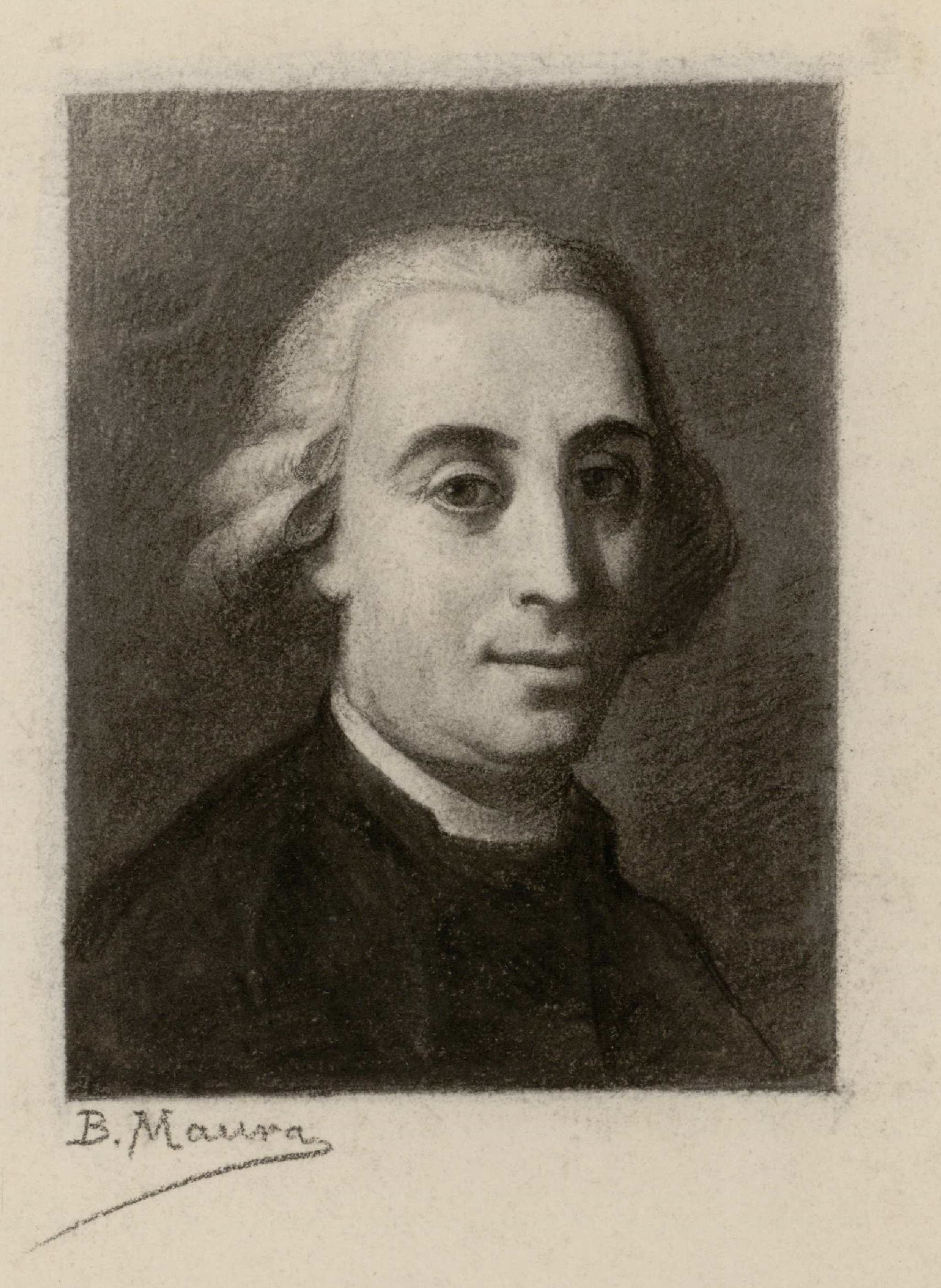 Retrato de Antonio Eximeno. Dibujo a lápiz carbón de Bartolomé Maura. Biblioteca Nacional de España.